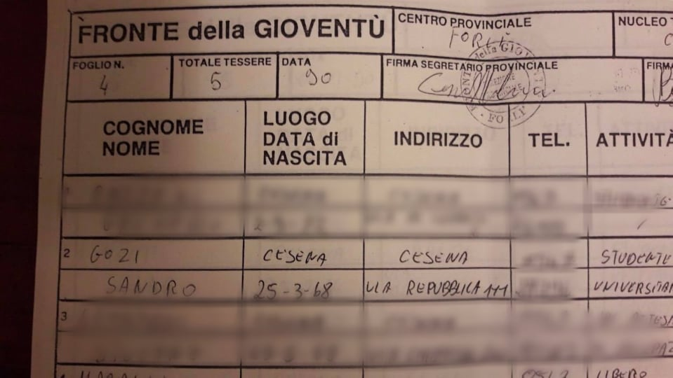 registro dei tesseramenti